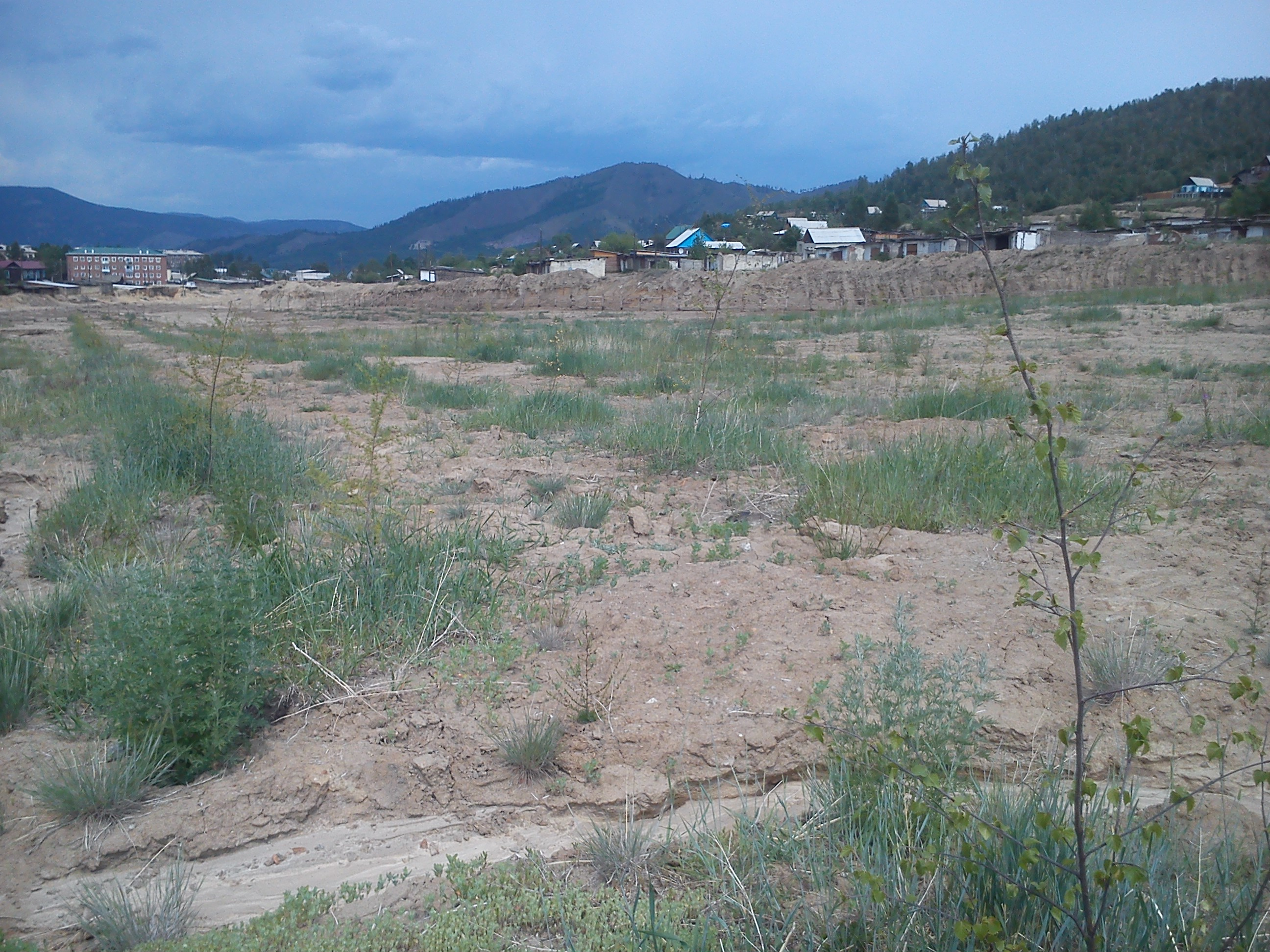 Рекультивация на территории хвостохранилища Джидинского ВМК, расчищенной от отвалов отходов обогащения рудоносных пород.